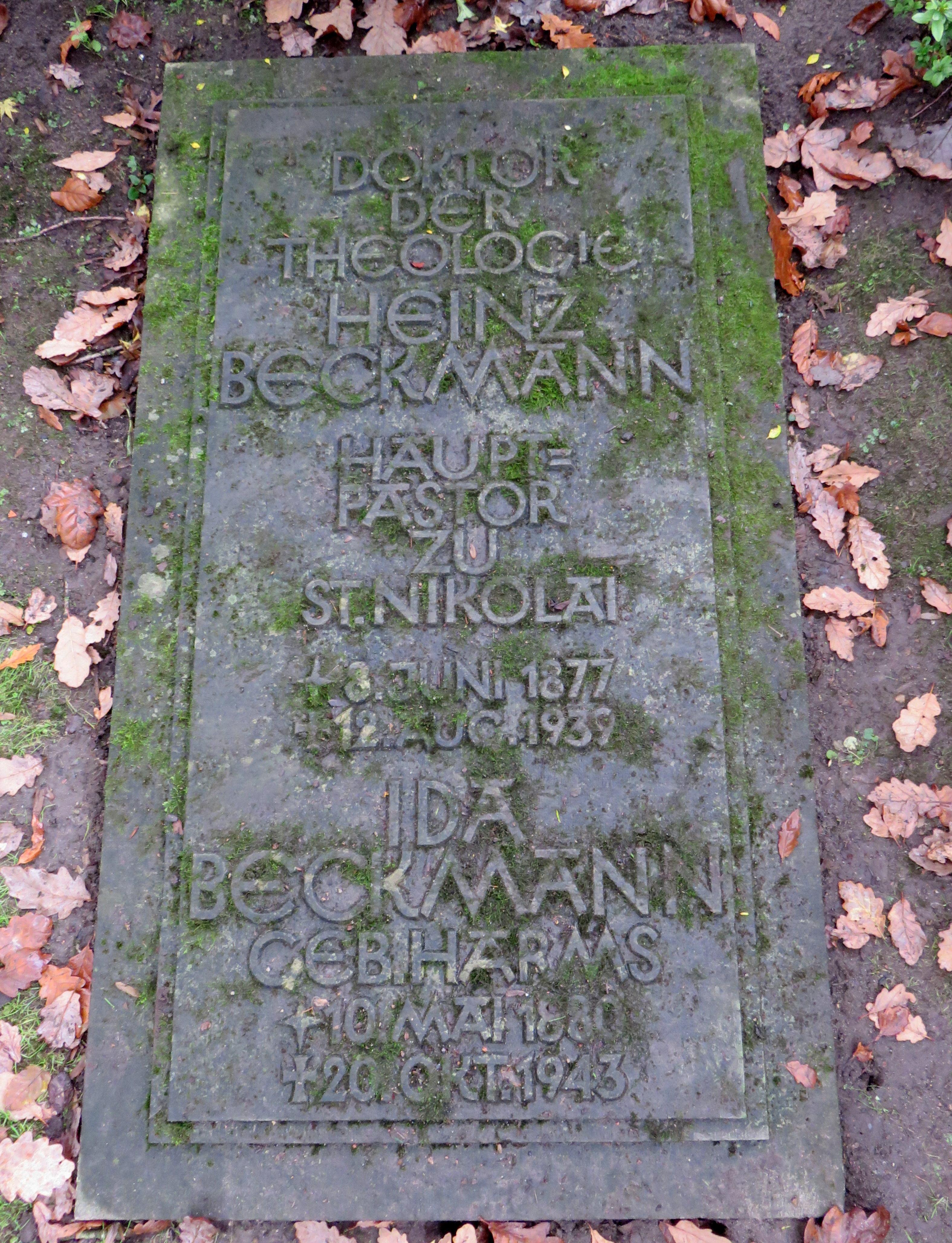 Grabplatte des deutschen lutherischen Theologen Heinz Beckmann, Friedhof Ohlsdorf, Planquadrat P 27 (neben dem Eingang zum Garten der Frauen).